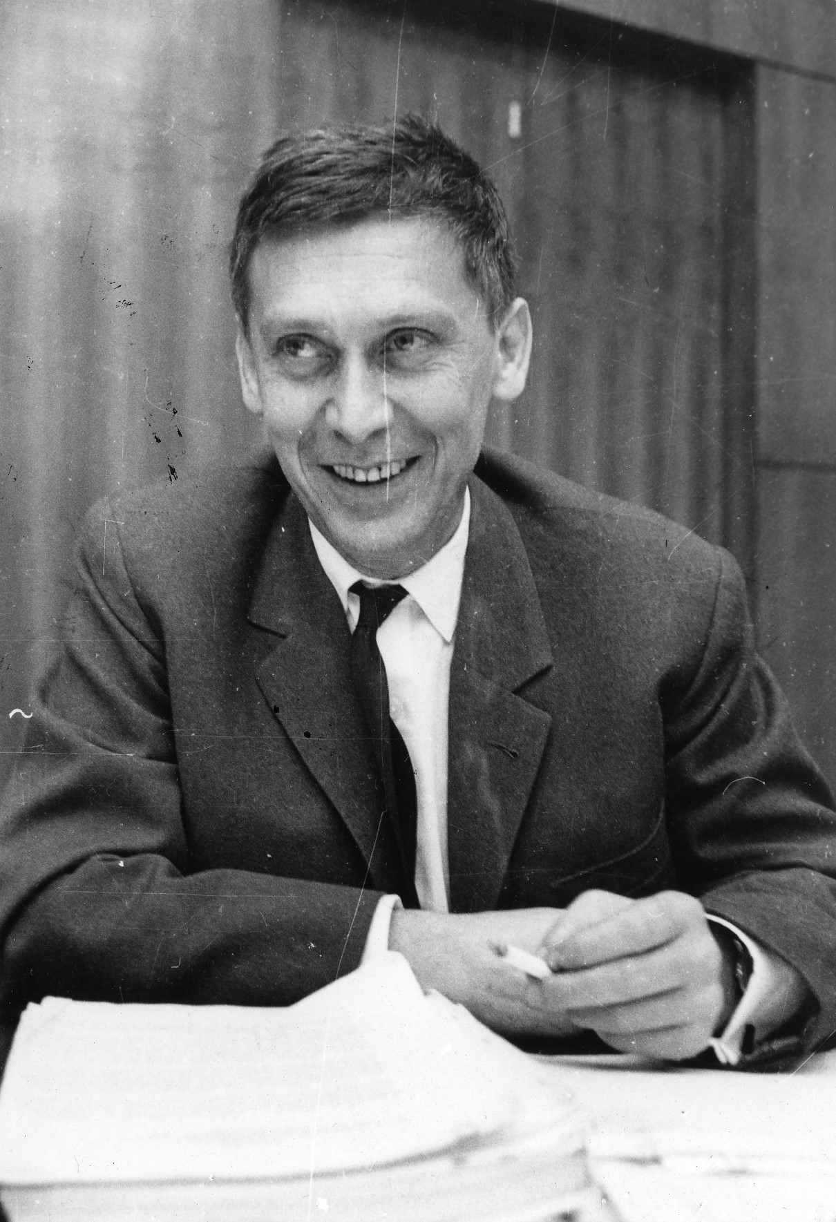 Slobodan Penezić Krcun, foto: Stevan Kragujević (po odobrenju kćerke Tanje Kragujević)